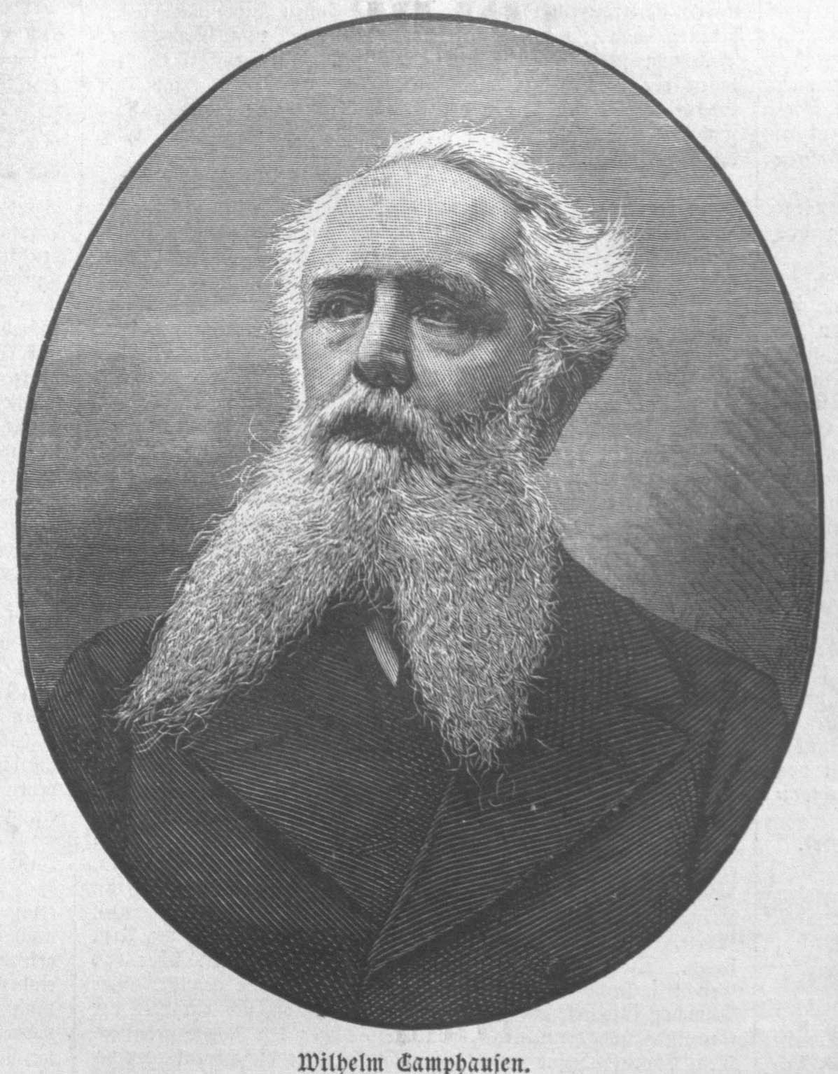 Portrait von Wilhelm Camphausen (Maler)